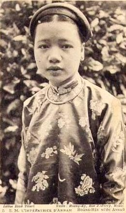 La reine Ho Thi Chi, femme du roi Khai Dinh (d'après M. Nguyen Duy Chinh, Vietnam)